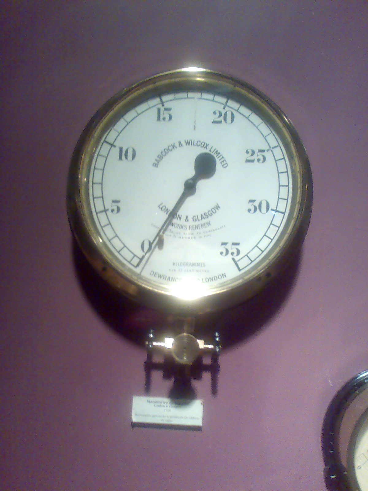 Manómetro de presión ubicado en el Parque de las Ciencias de Granada